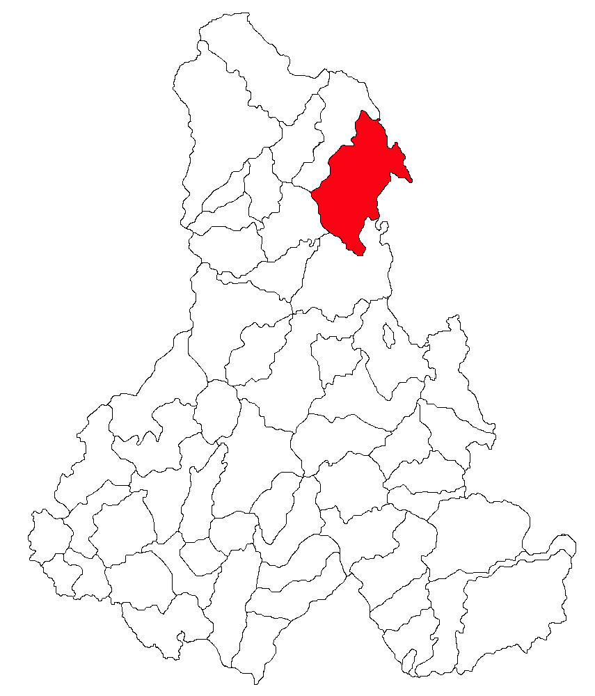 Categorie:Hărţi ale judeţului Harghita Contents 1 Licensing 2 Sursă 3 Licensing 4 Original upload log Licensing Sursă ro::Imagine:Harta_jud_Harghita.png